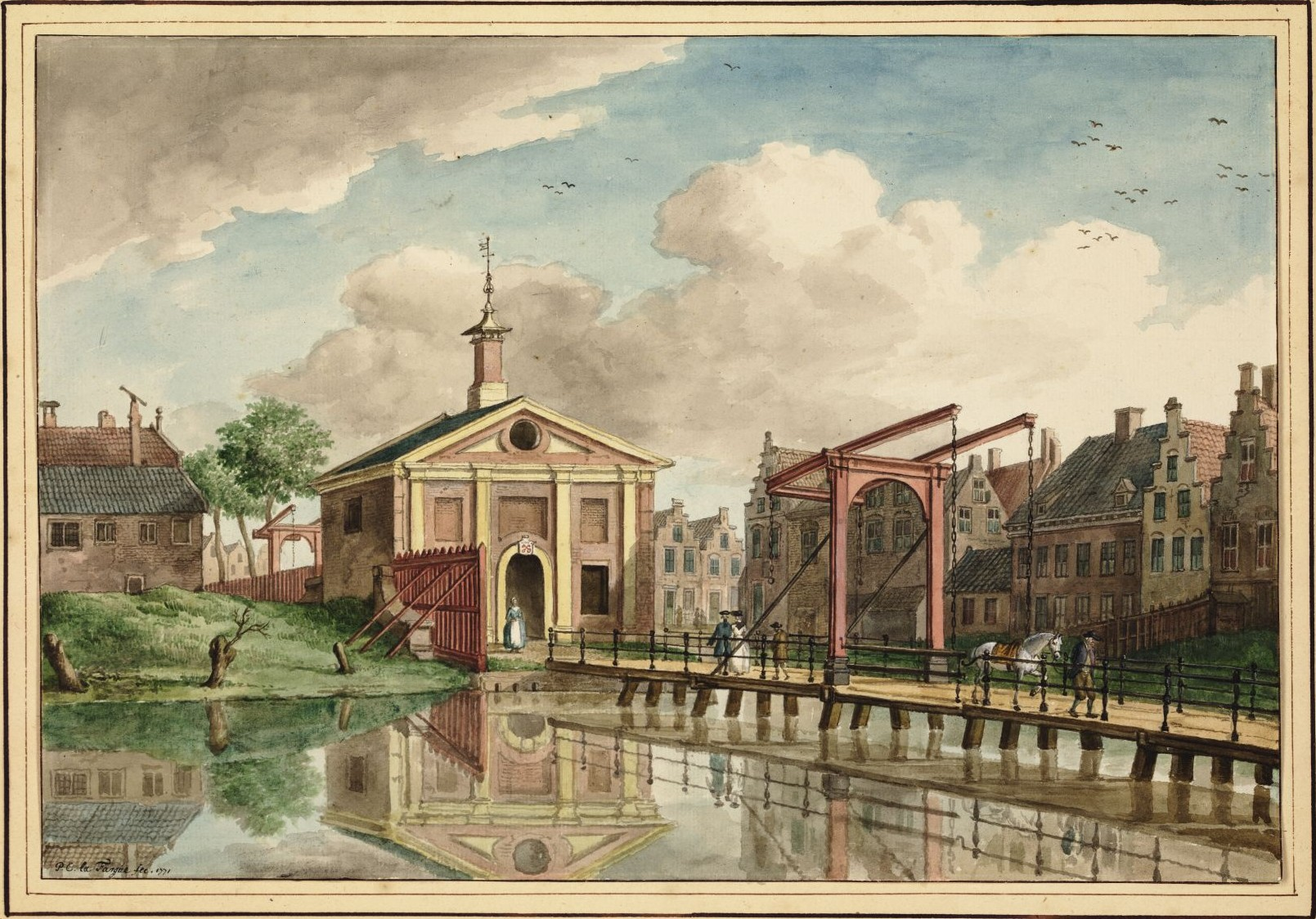 Herenpoort (city gate)